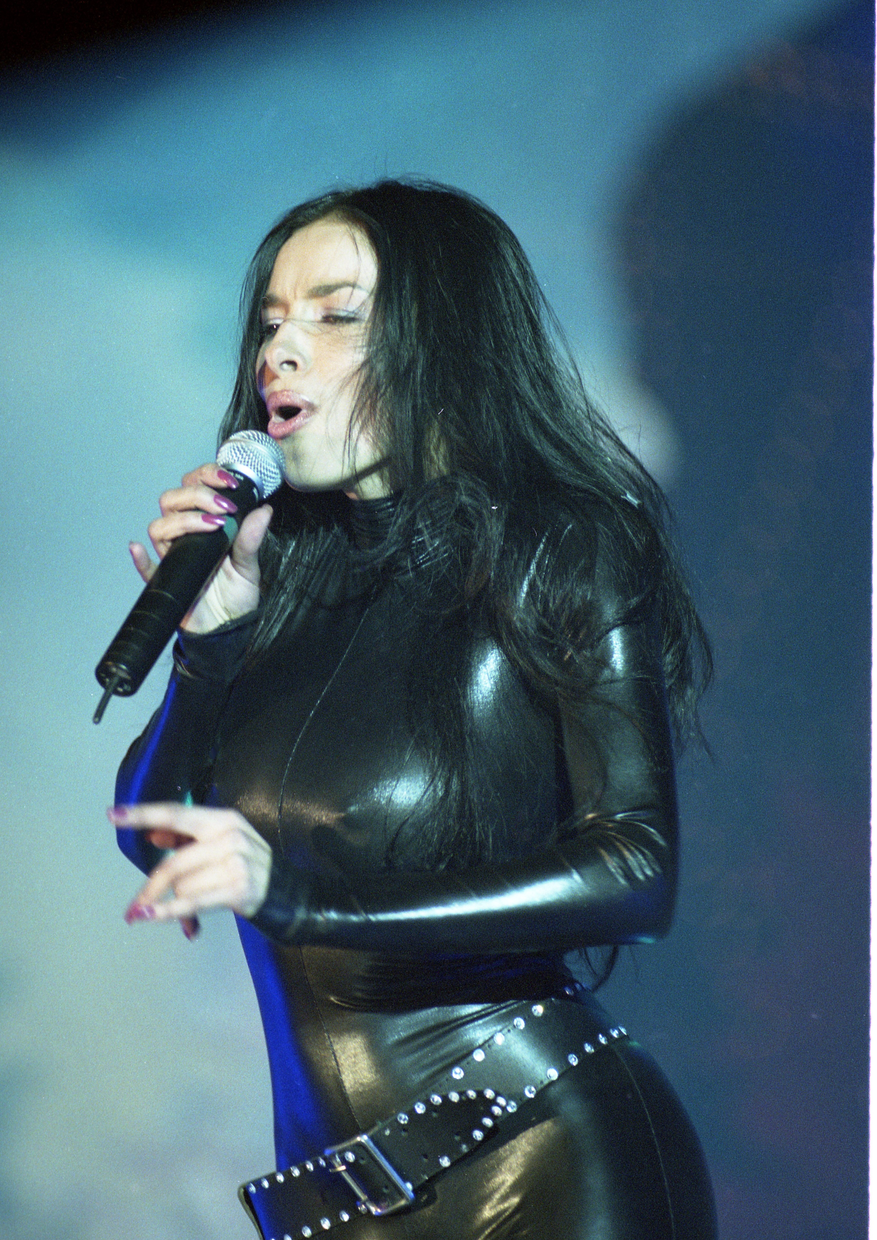 Надежда Грановская в составе группы ВИА Гра на съёмках Рождественских встреч в декабре 2001 года